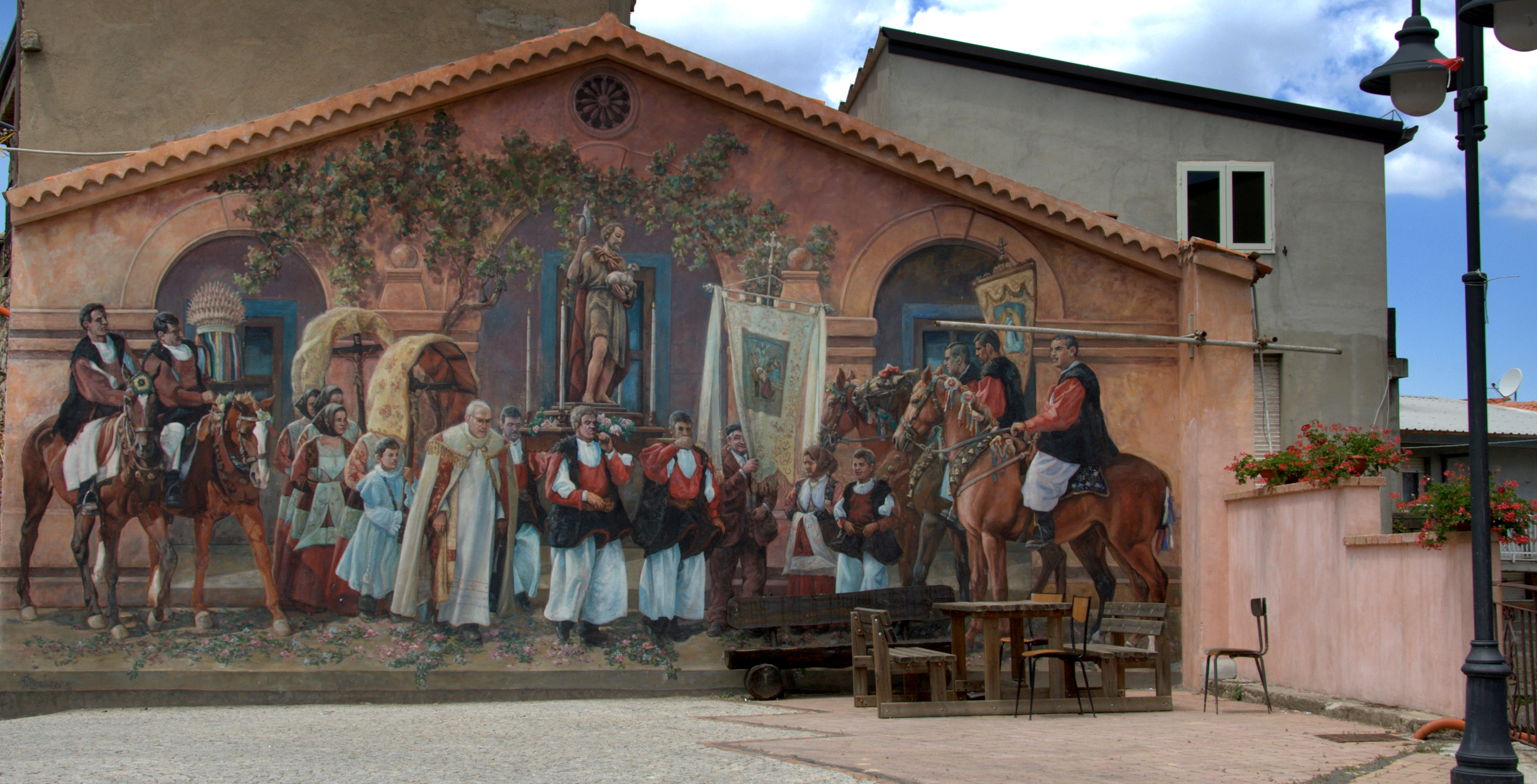 Murales di Fonni / Street Art in Fonni / Вуличне мистецтво